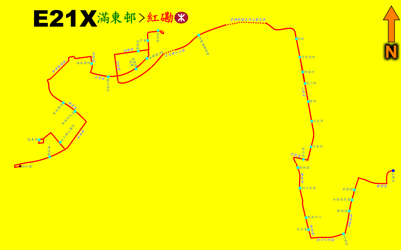 中文（香港）: 城巴S52P線的走線圖